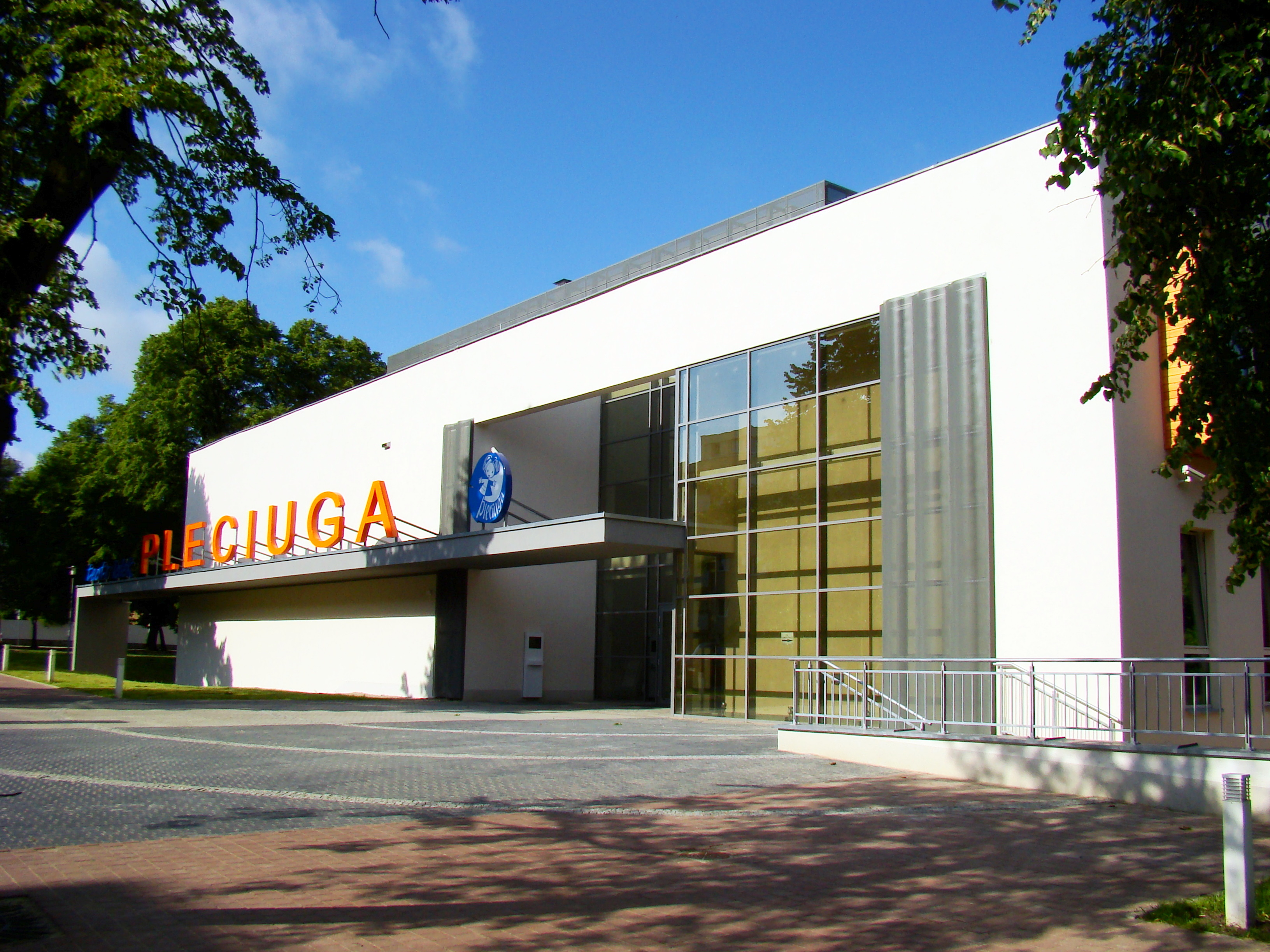 Teatr Lalek Pleciuga, Szczecin, Polska